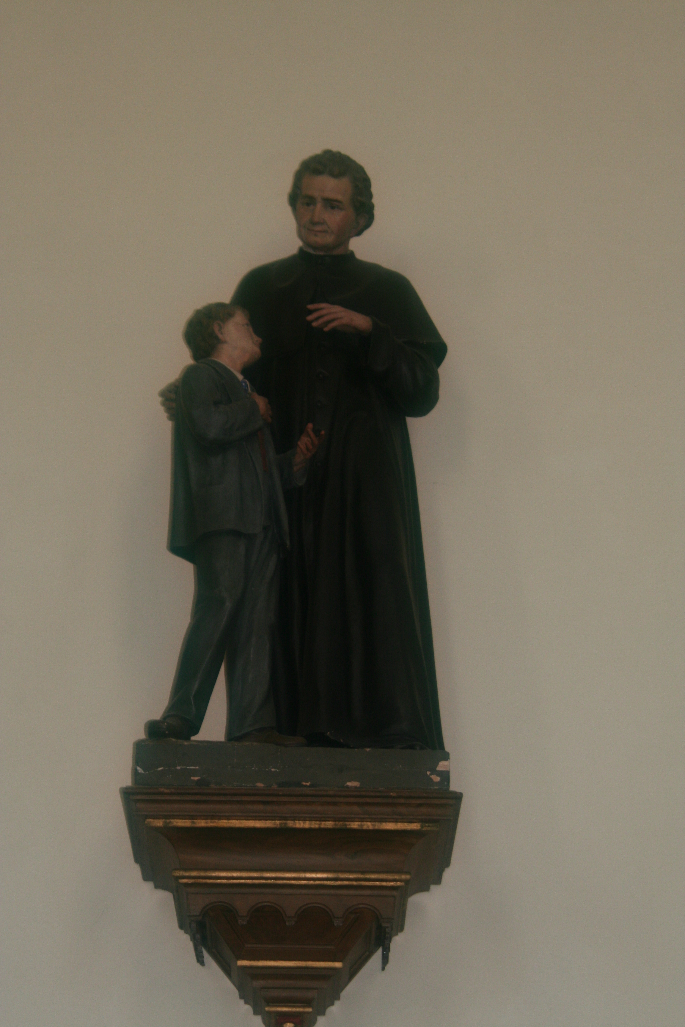 Franziskanerkloster Innichen, Don Bosco